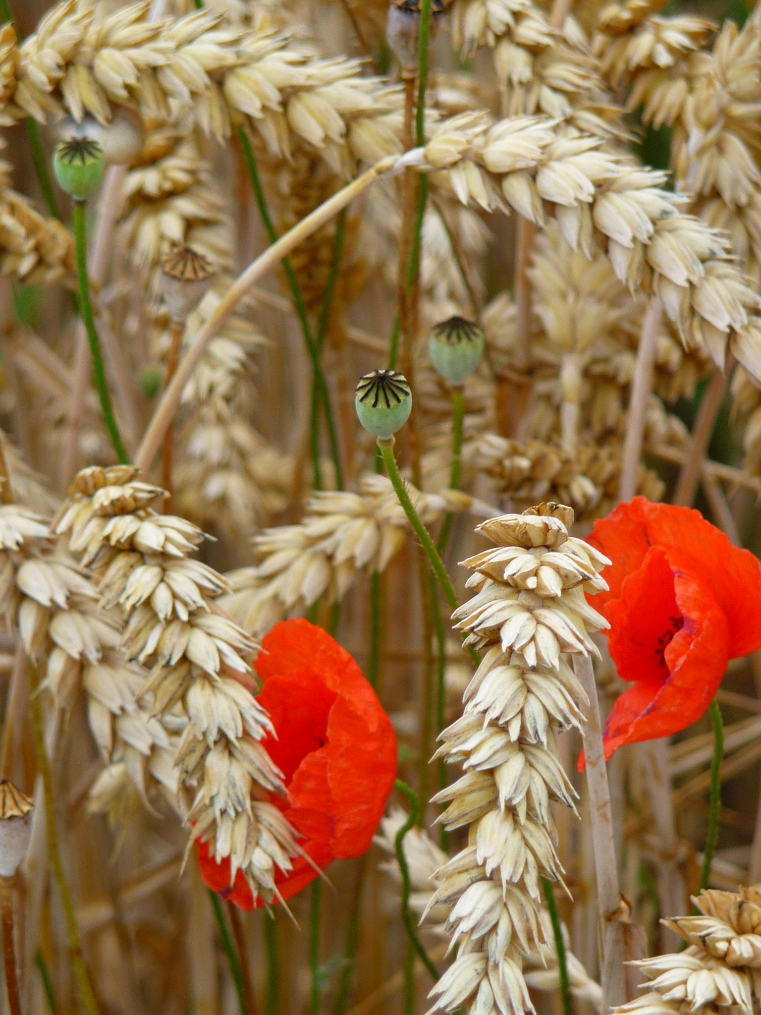 Klatschmohn (Papaver rhoeas) in einem Weizenfeld (Triticum)